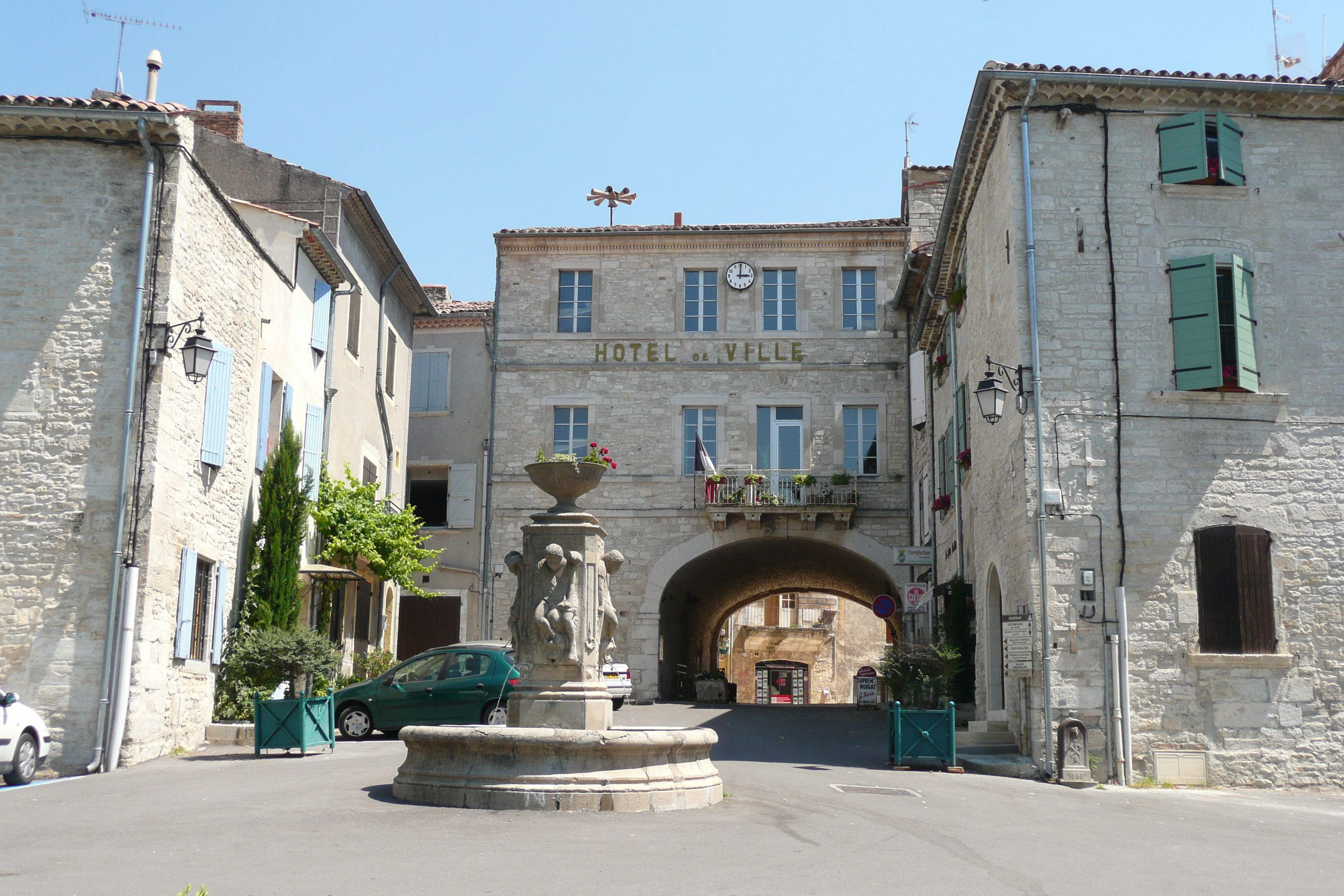 Hôtel de ville à Barjac (Gard).